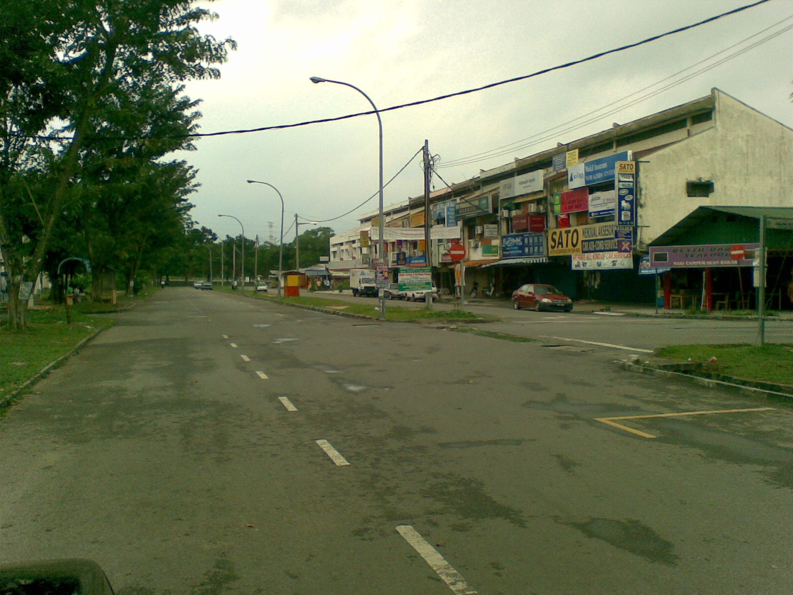 Bandar Baru Bangi Business Area